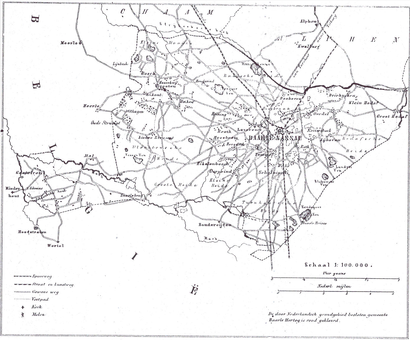 Kaart van Nederlandse gemeente Baarle Nassau, uit de Gemeente Atlas van Nederland, 1868